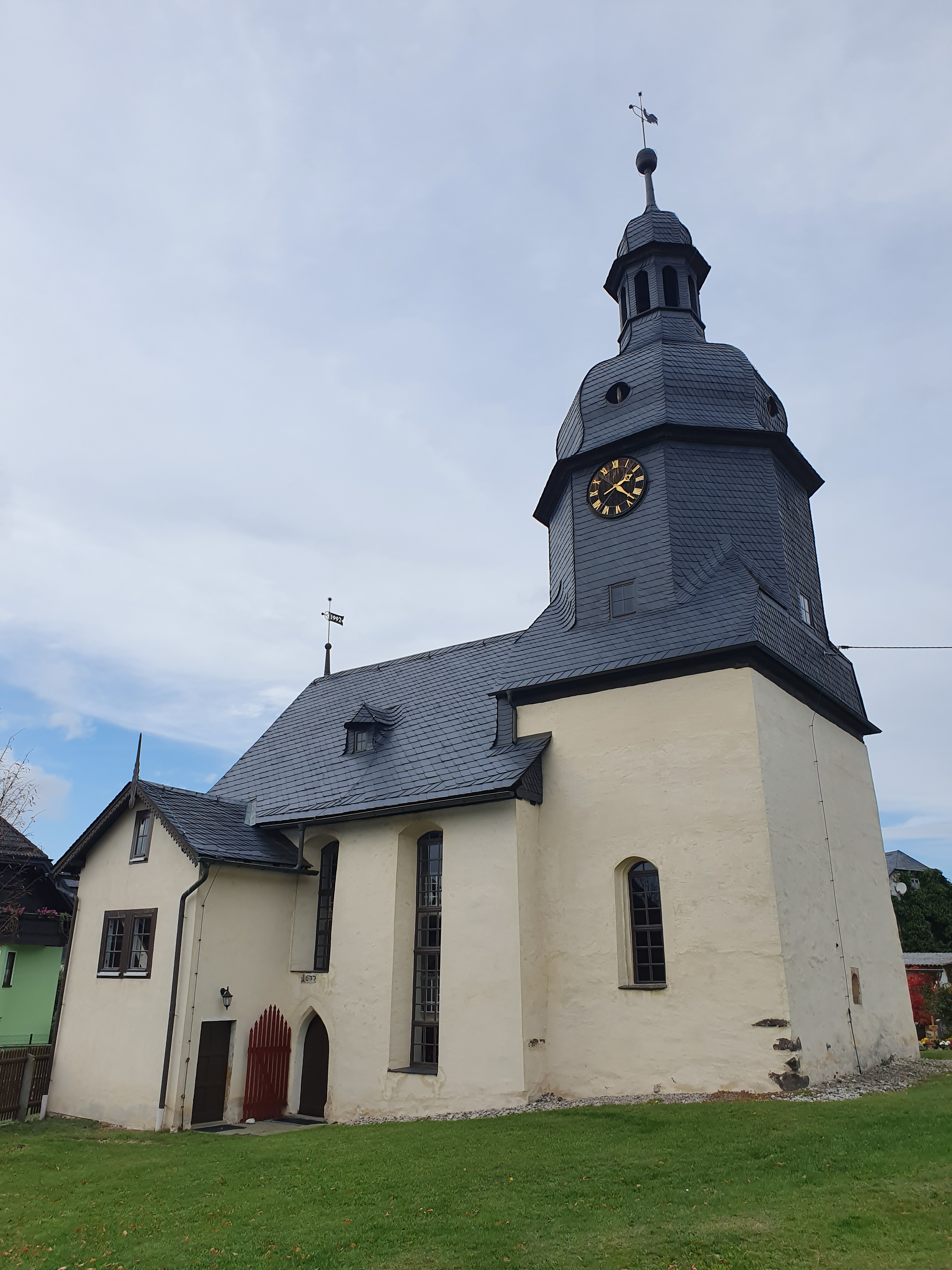 Kirche in Thimmendorf, Remptendorf in Thüringen